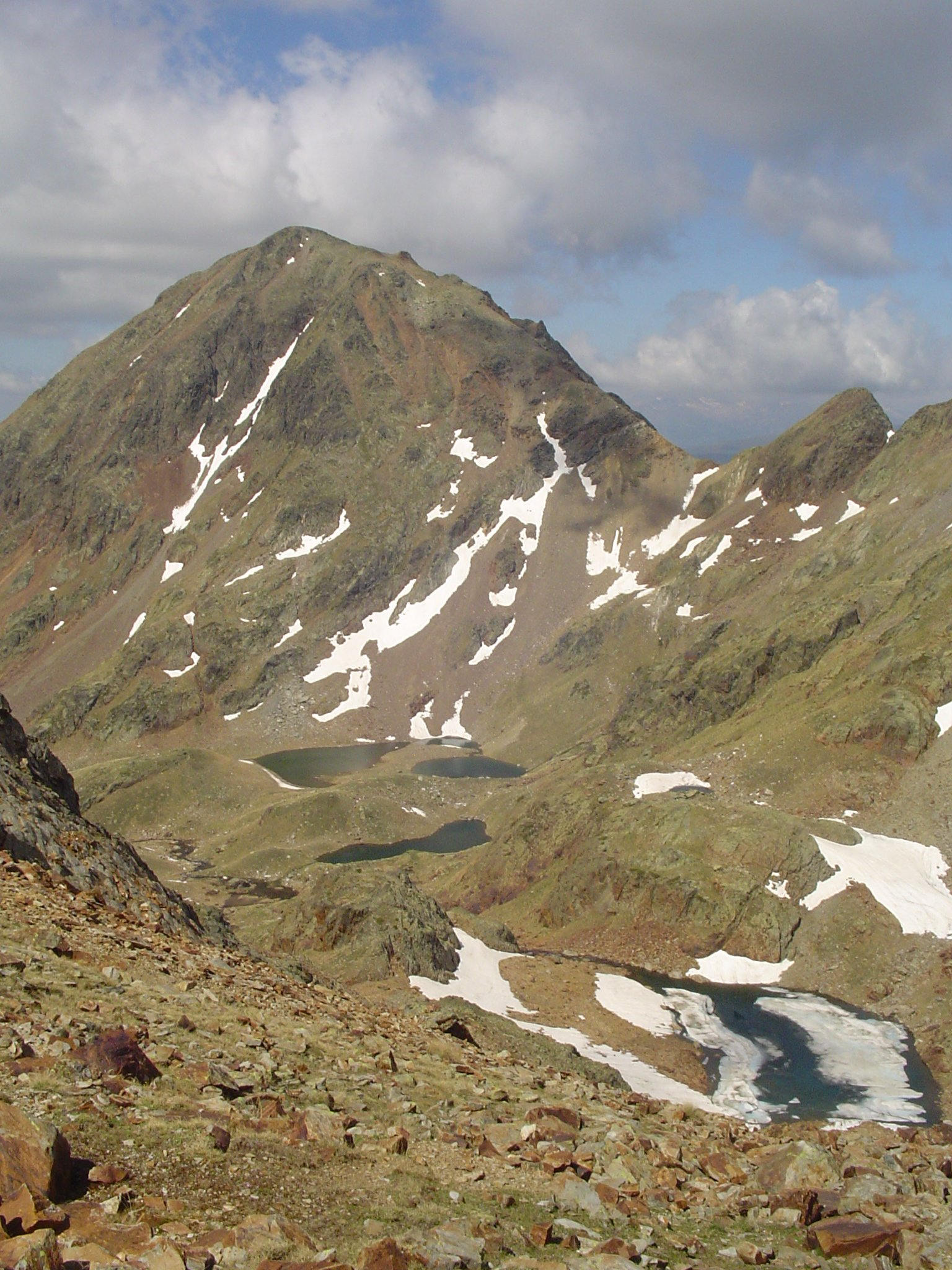 Pic de Baborte i Estanys de la Coma de Sotllo (juny 2007)